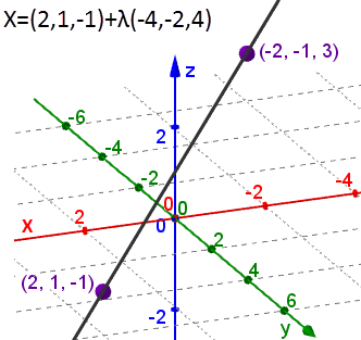 Права 3д - векторски облик